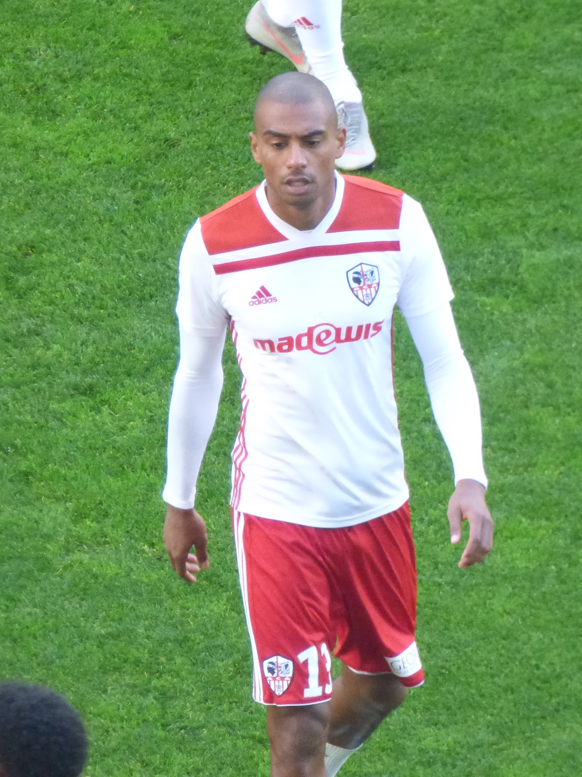 Yann Boé-Kane avant le match RC Lens - AC Ajaccio, comptant pour la dix-neuvième journée du championnat de France de Ligue 2 2018-2019, le 22 décembre 2018, au Stade Bollaert-Delelis de Lens.